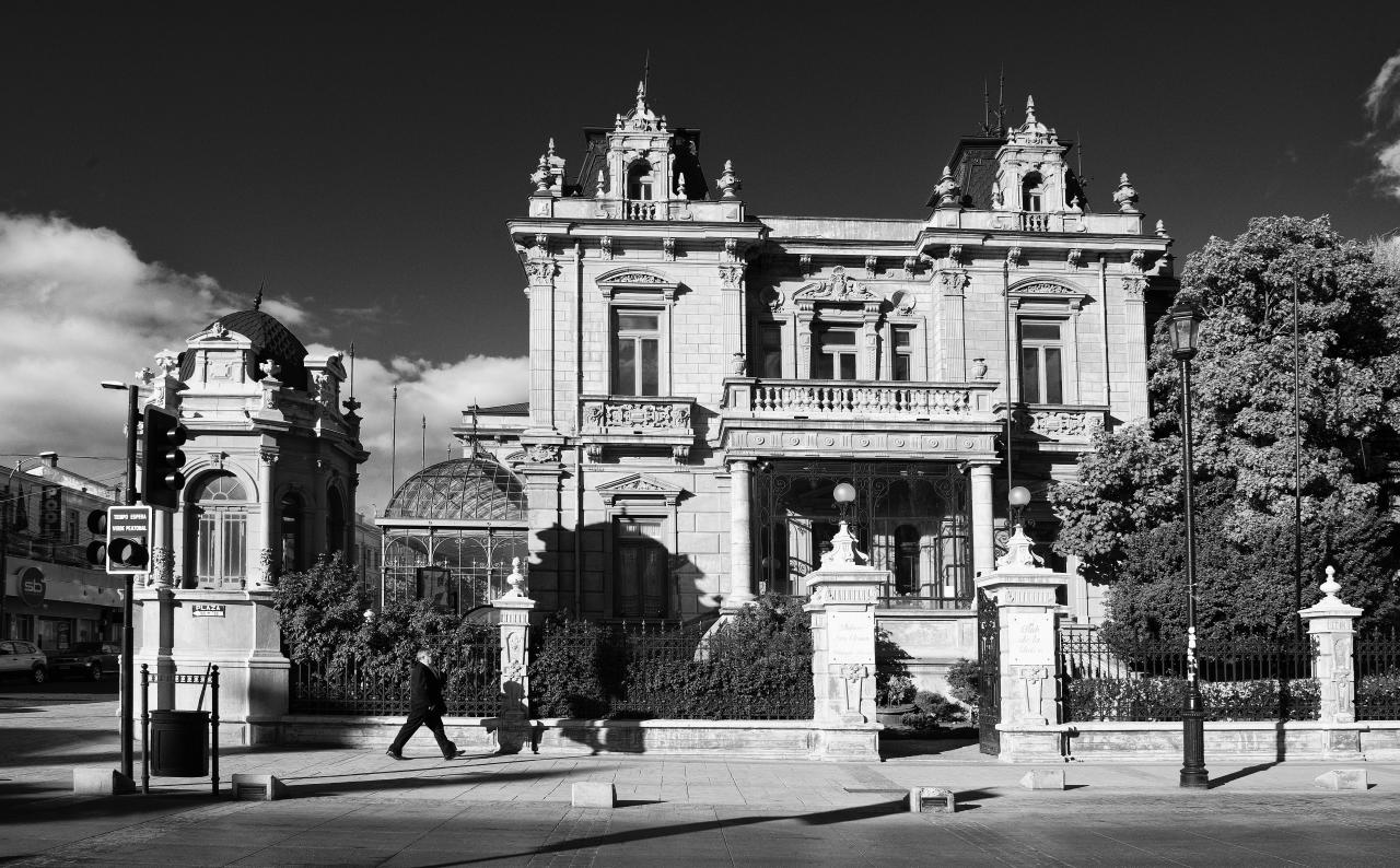 punta_arenas1